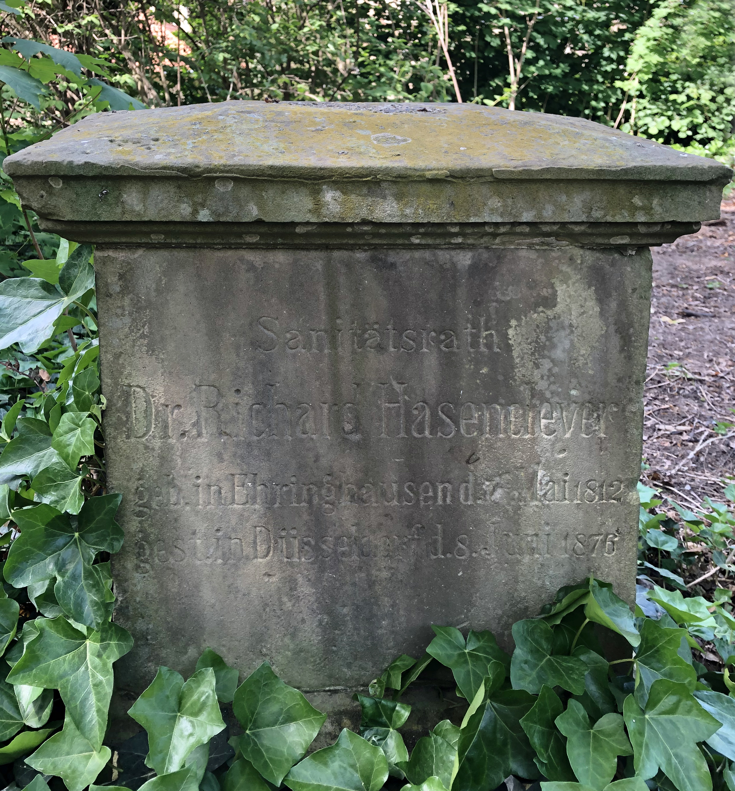 Grabstein Richard Hasenclever, Golzheimer Friedhof (S)